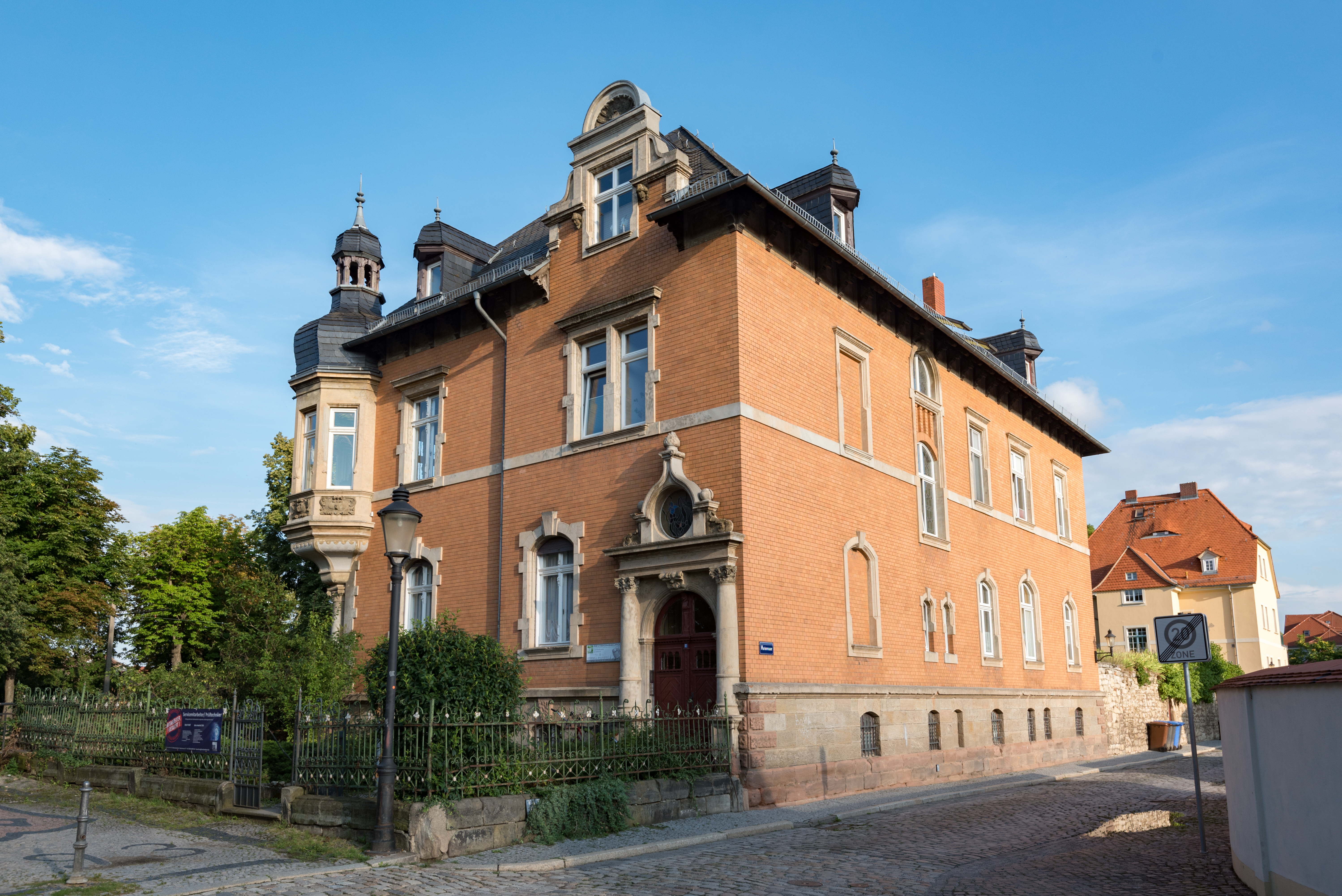 Naumburg (Saale), Marienmauer 17